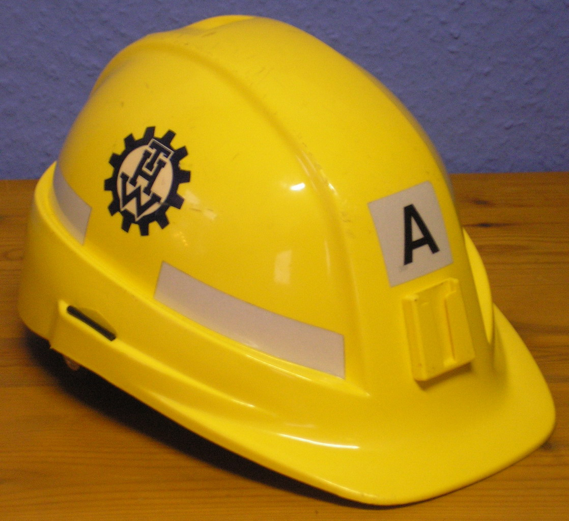 THW Helm der Firma Casco